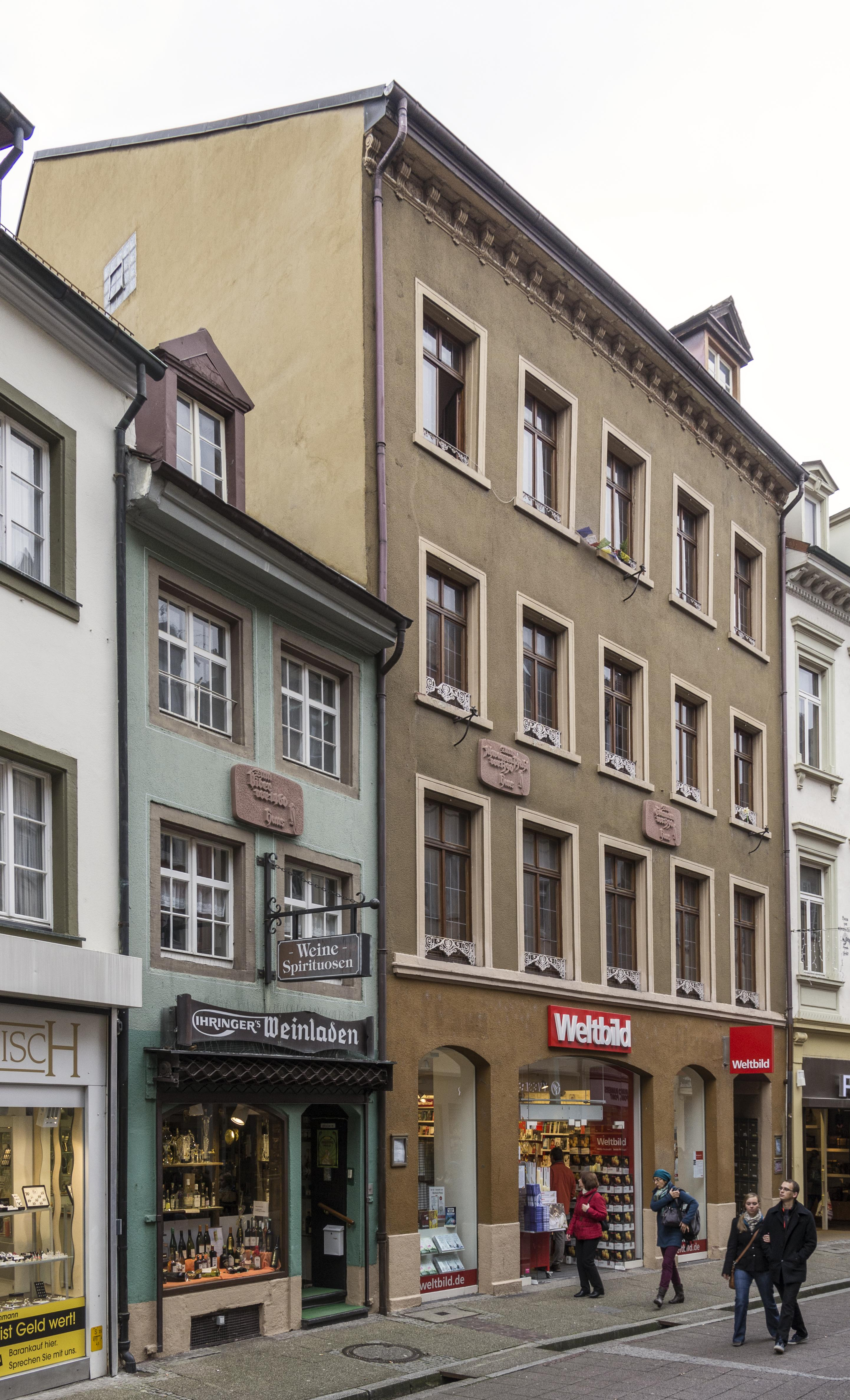 Gebäude in Freiburg im Breisgau